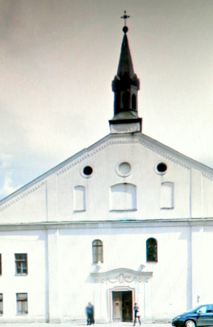 Levočská 12. Malý, slovenský, vikariálny kostol Nepoškvrneného počatia Panny Márie. Doba vzniku 1757 Prevládajúci sloh baroko je vedený v zozname národných kultúrnych pamiatok SR. Mesto Spišská Nová Ves.